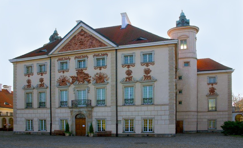 Otwock Wielki in Poland